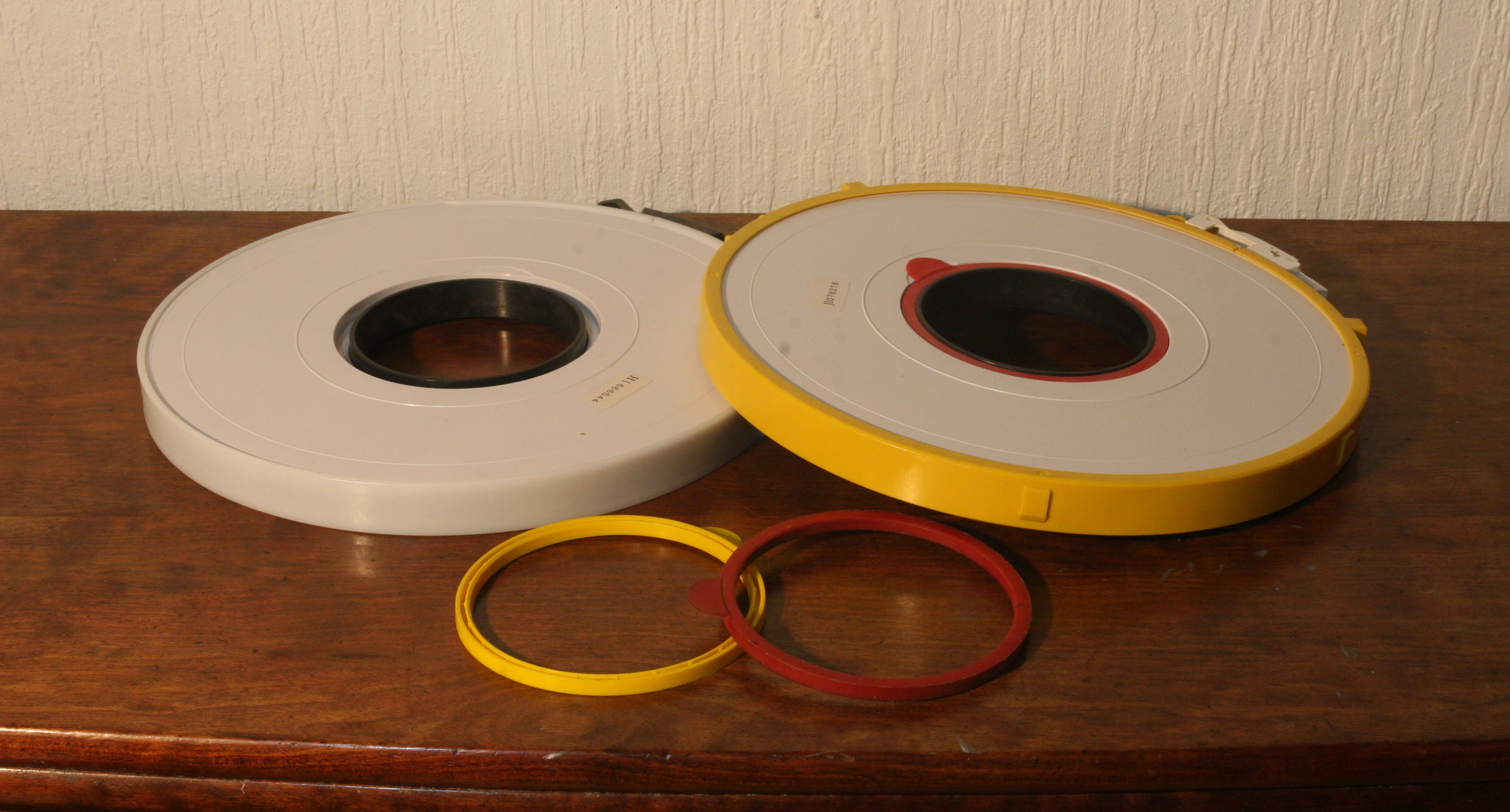 Skriveringe. Bagerst to magnetbånd, det til højre har monteret en skrivering.